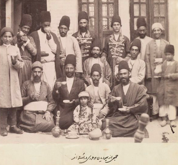 Groupe de juifs lors d'une cérémonie de mariage